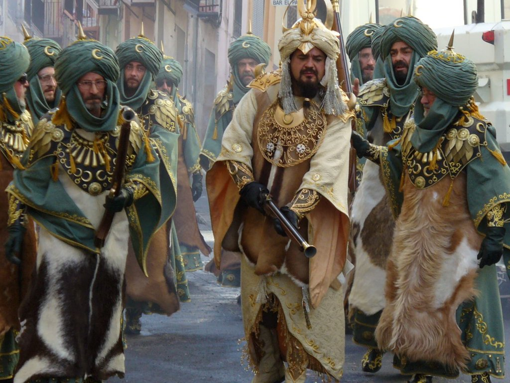 Detalle del "encaro" de la tarde en el "partidor"